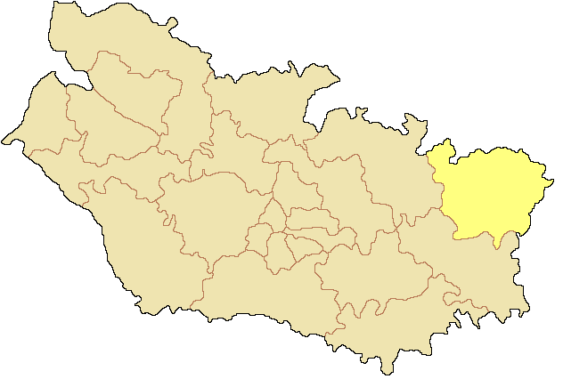 Canton de Péronne dans le département de la Somme